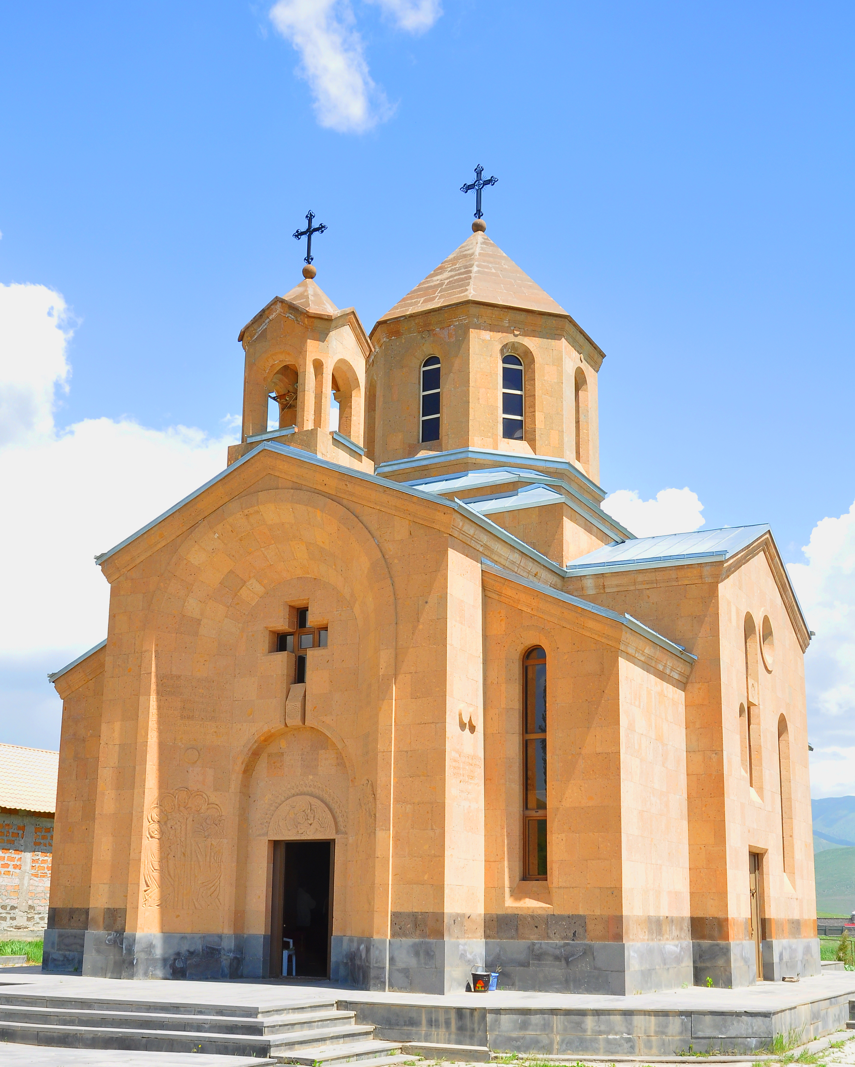 Սրբոց Նահատակաց եկեղեցի